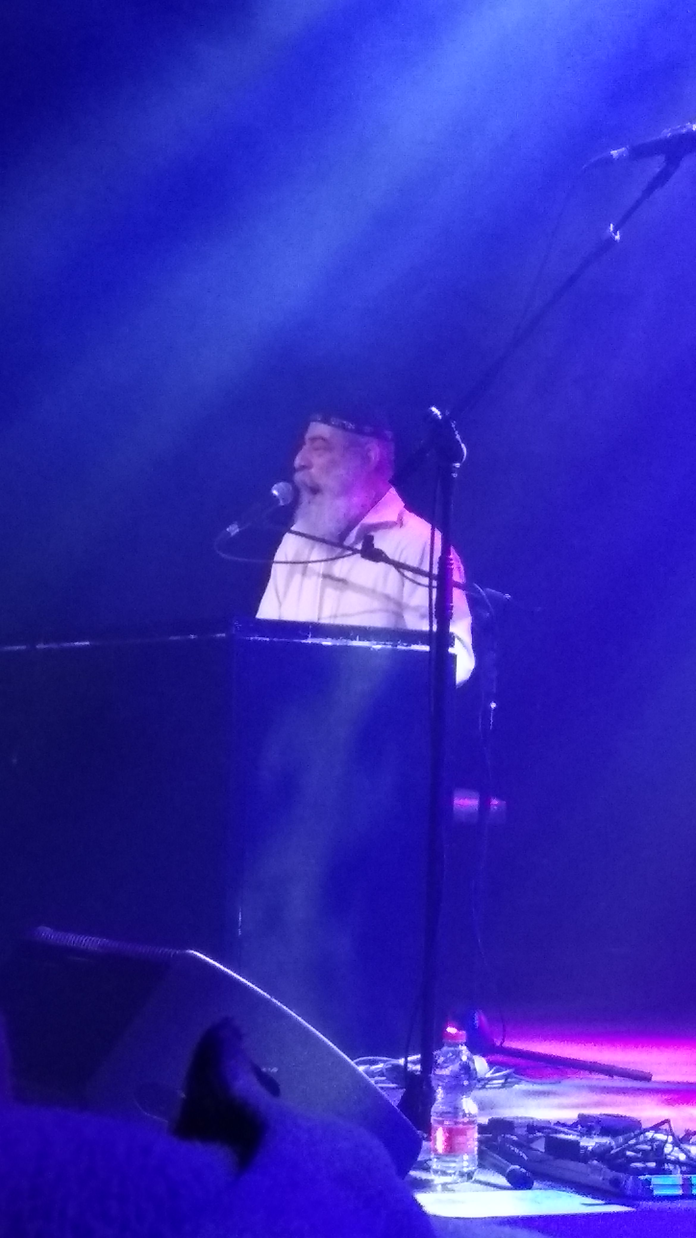 אריאל זילבר במהלך הופעה בגריי יהוד, 2018